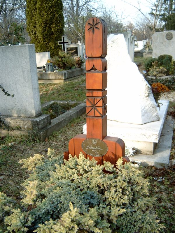 Suka Sándor (Farkaslaka, Románia, 1921. január 1. – Budapest, 1993. szeptember 17.) színművész sírja Budapesten. Farkasréti temető: 25-6-13/1.